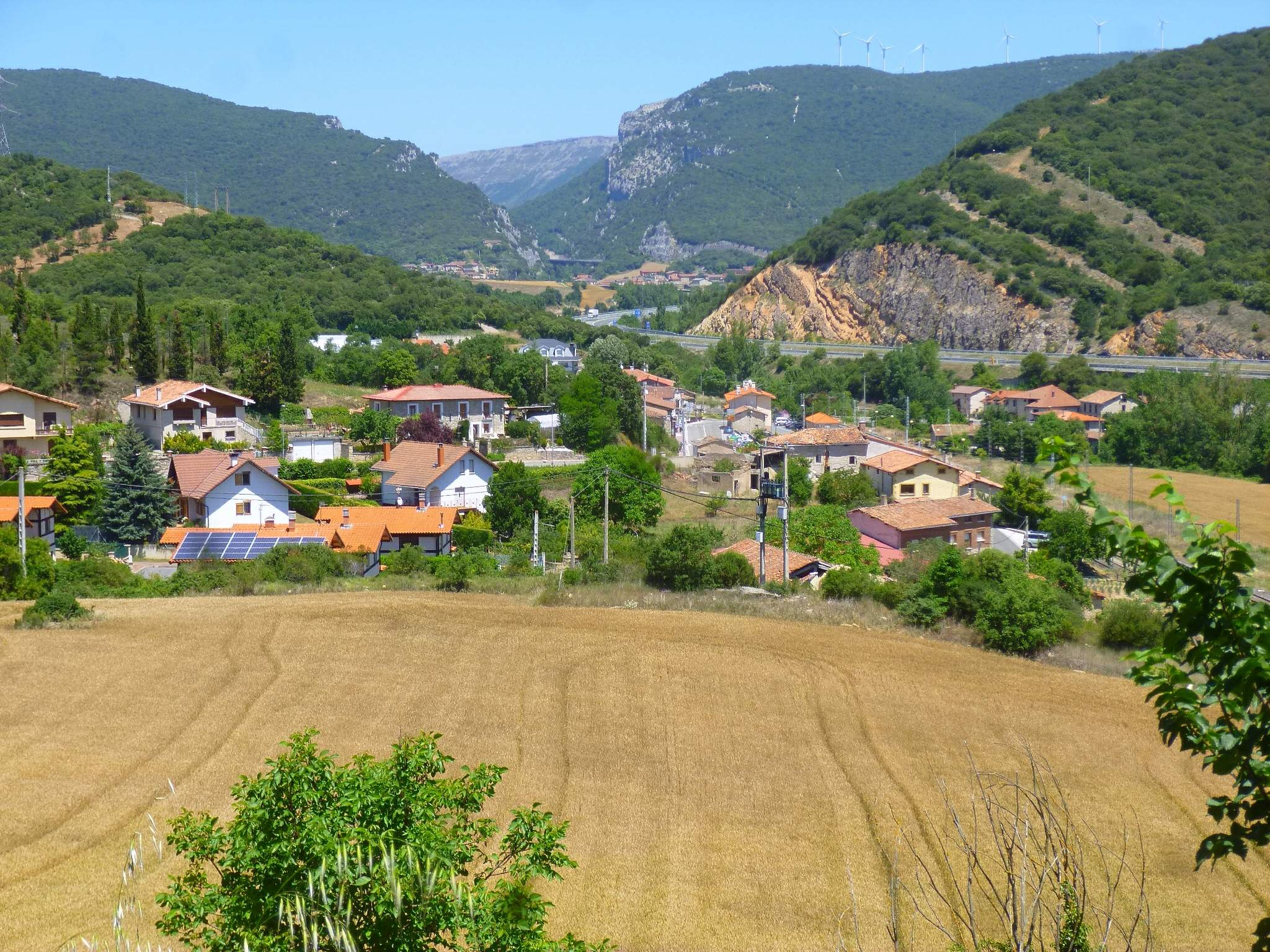 Pobes (Ribera Alta, Álava)